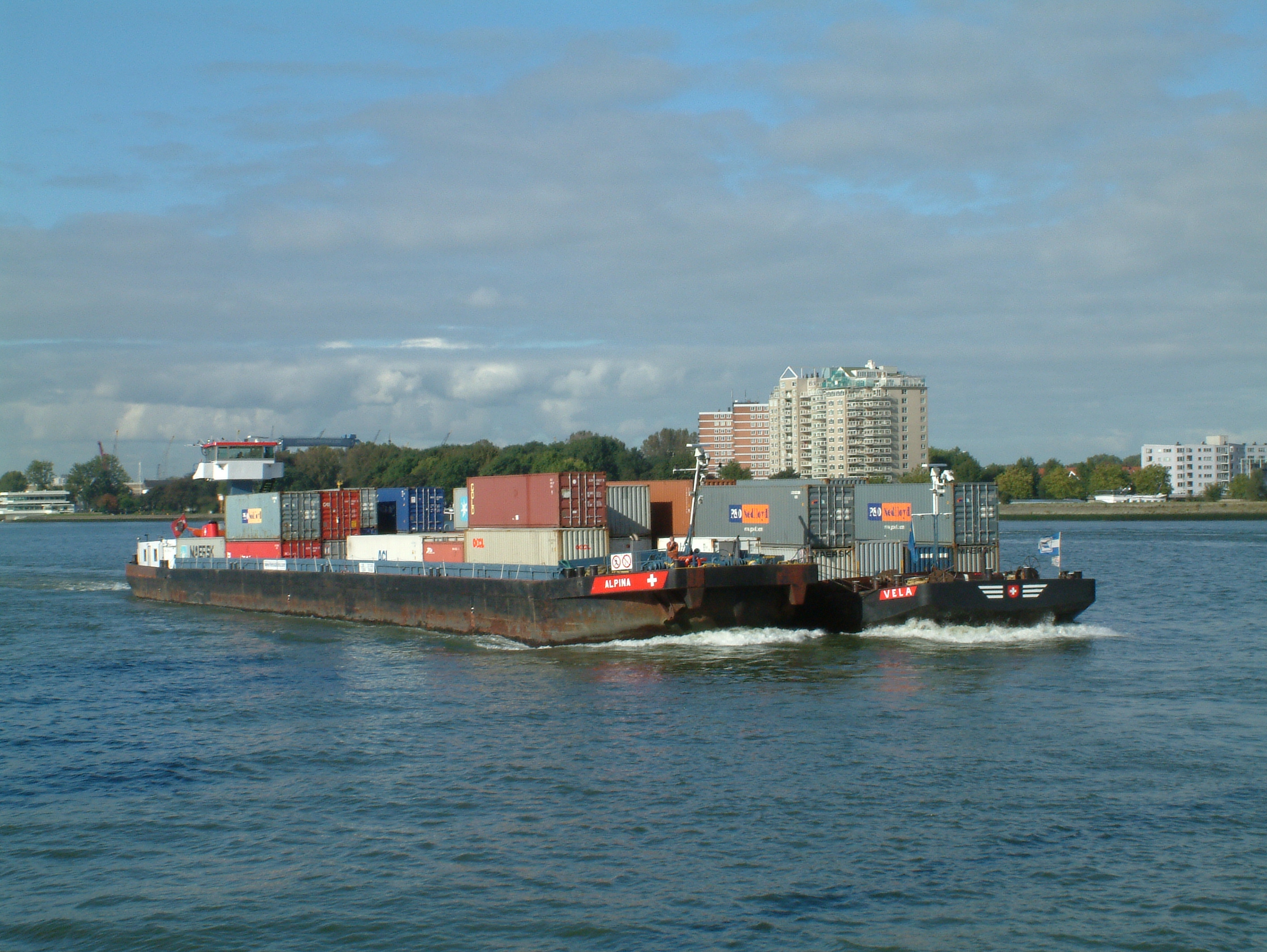 De ALPINA op de Nieuwe Maas in Rotterdam.